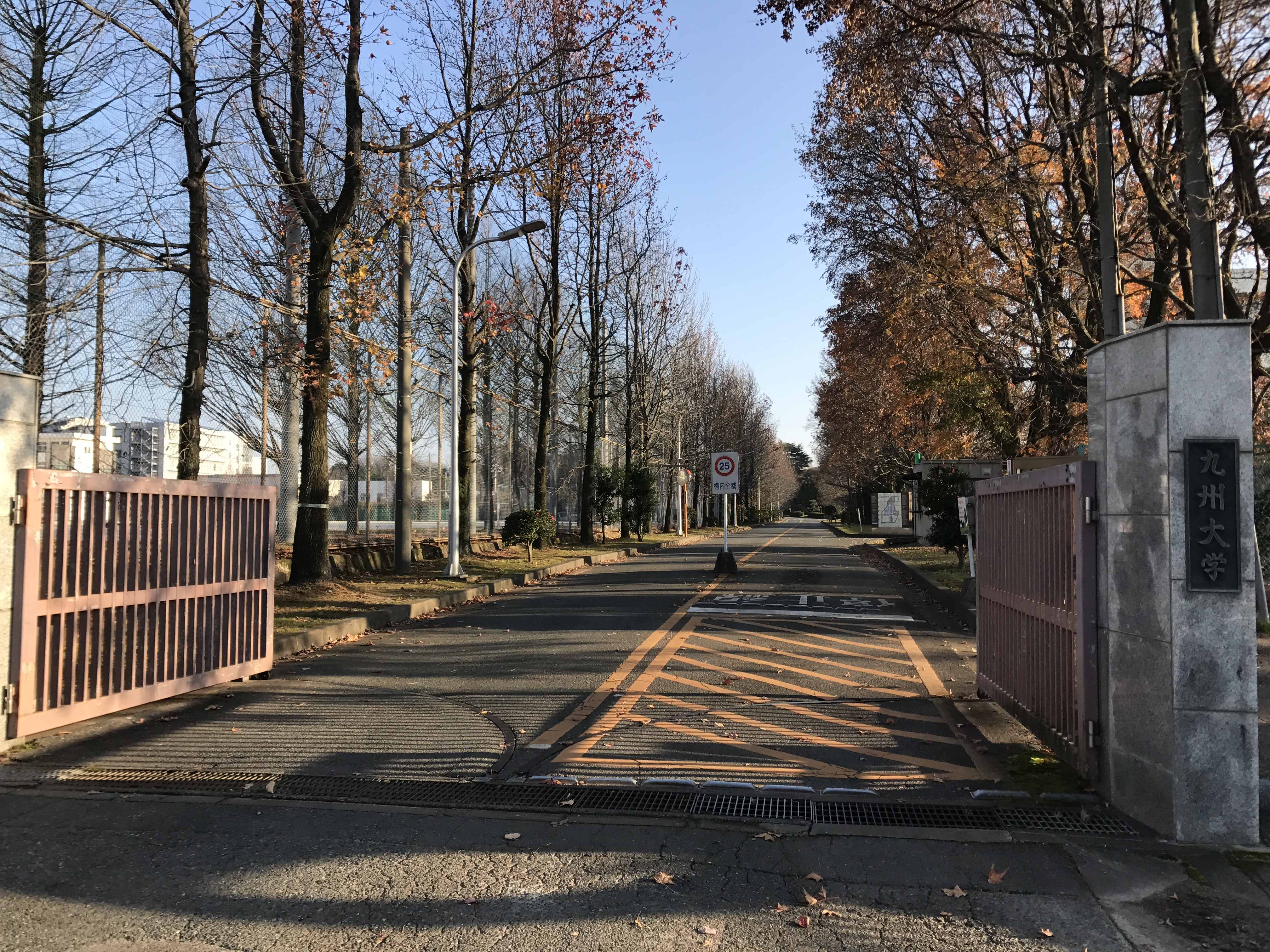 九州大学筑紫キャンパスの北門